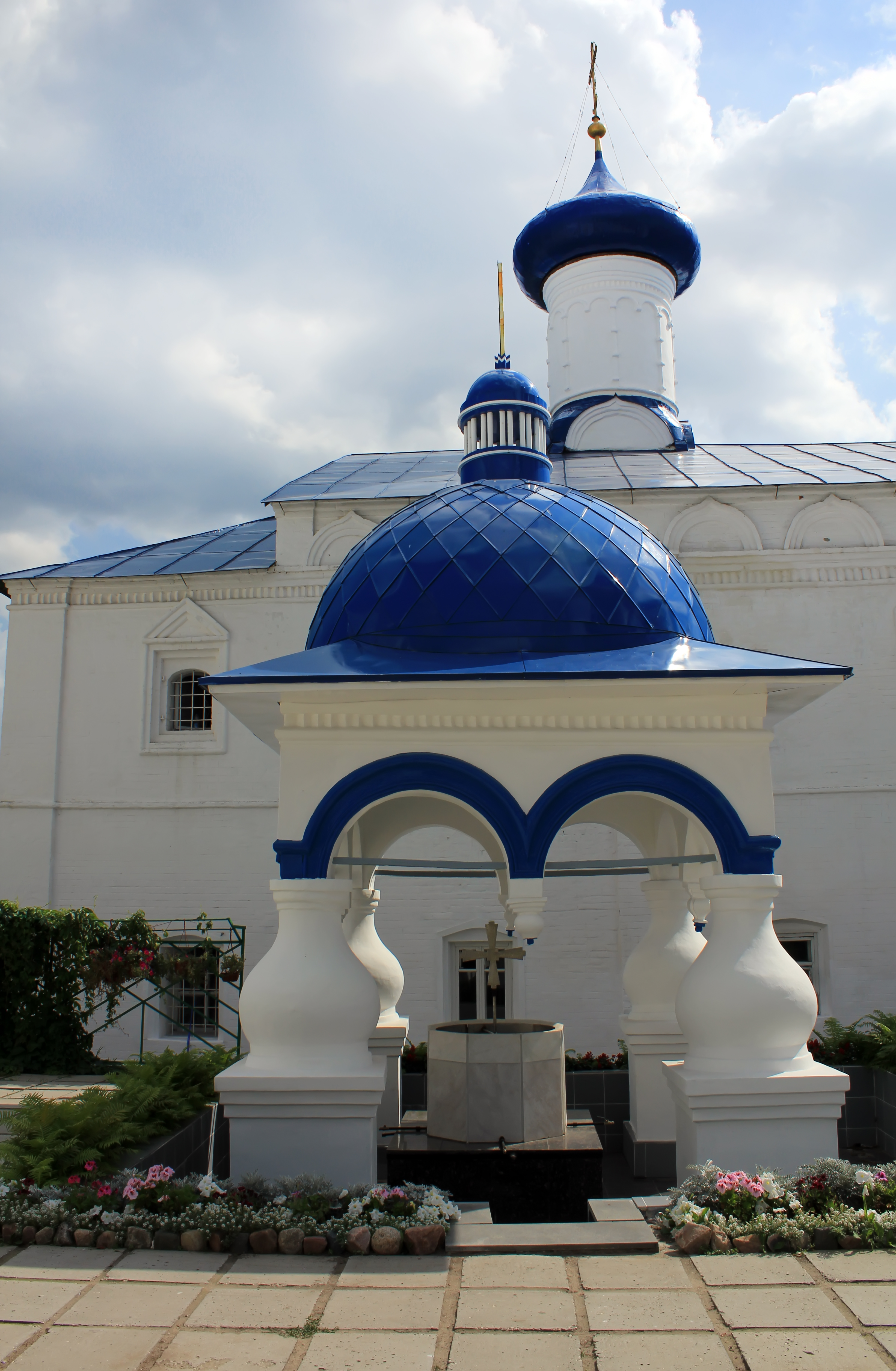 Киворий (Владимирская область, Владимир, р. п. Боголюбово)